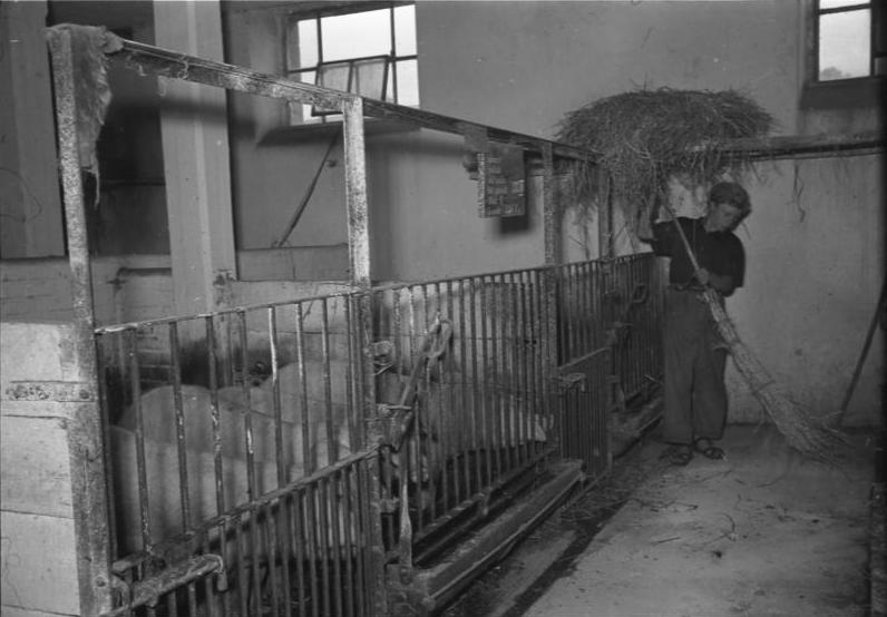 Landesumschulungshof Finkenbach